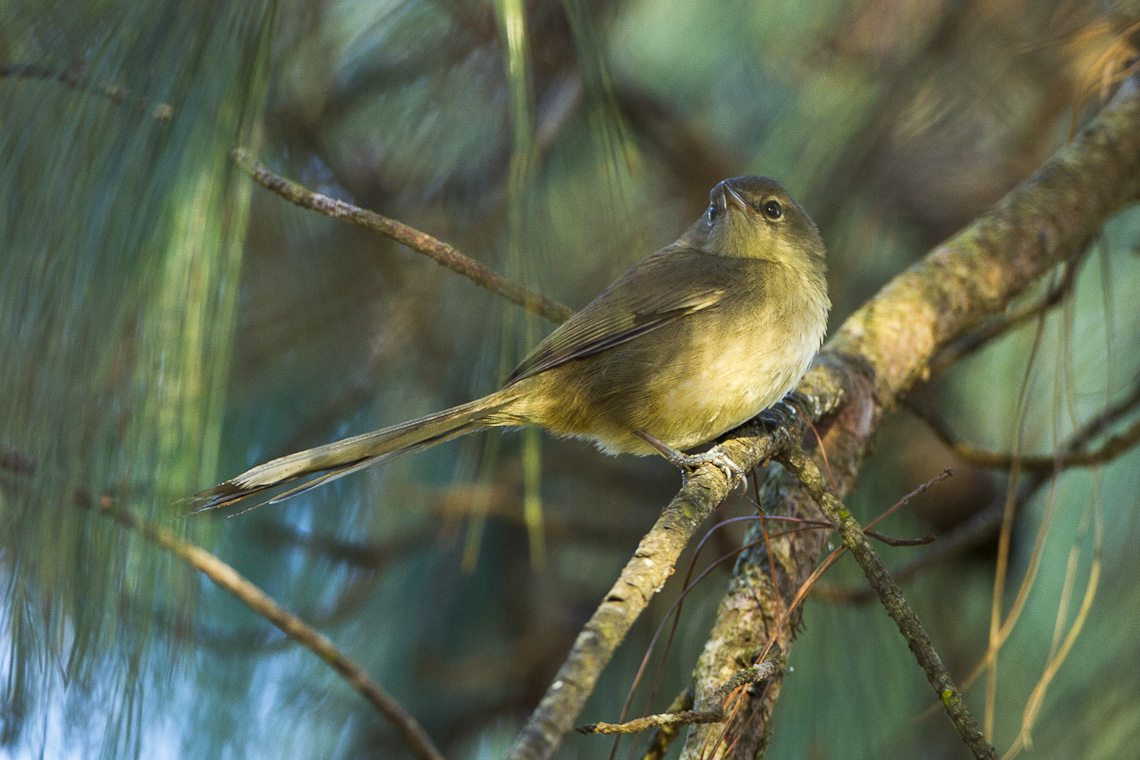 Madagascar Brush Warbler - Ranomafana - Madagascar_S4E7999